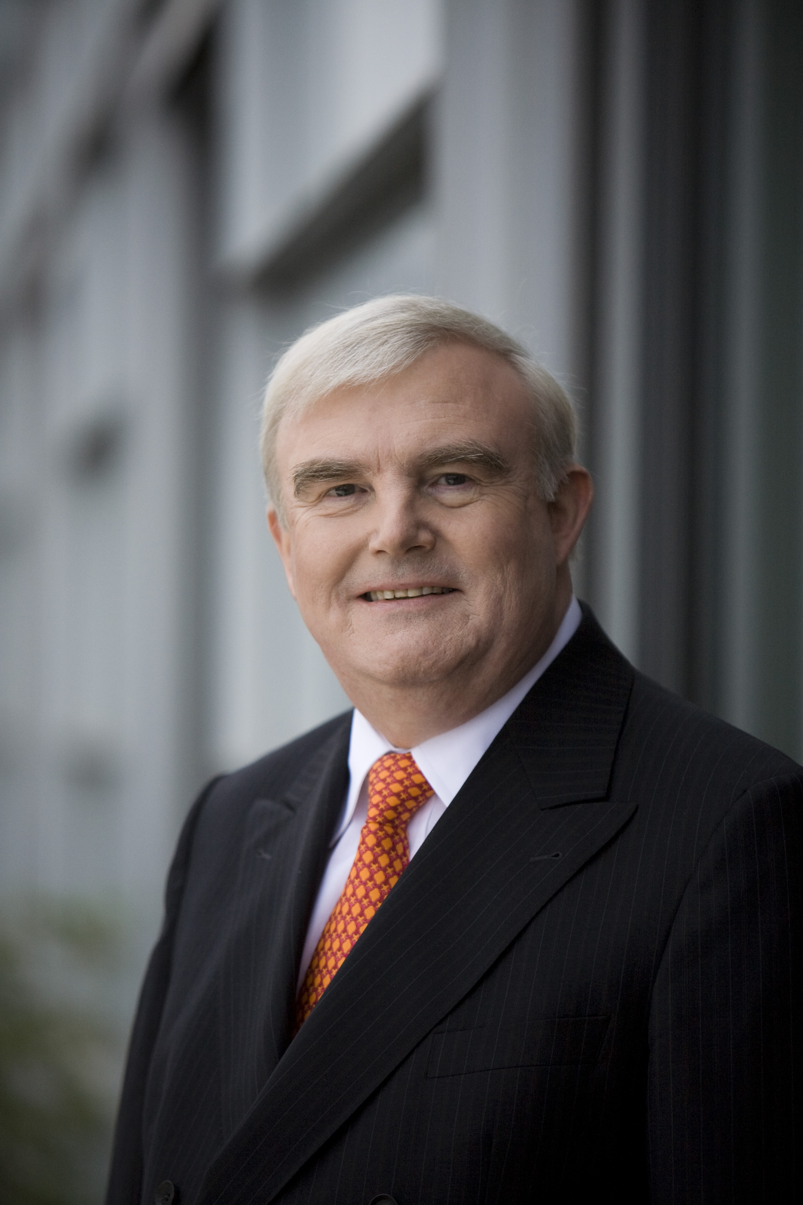 Prof. Dr. Hans Heinrich Driftmann